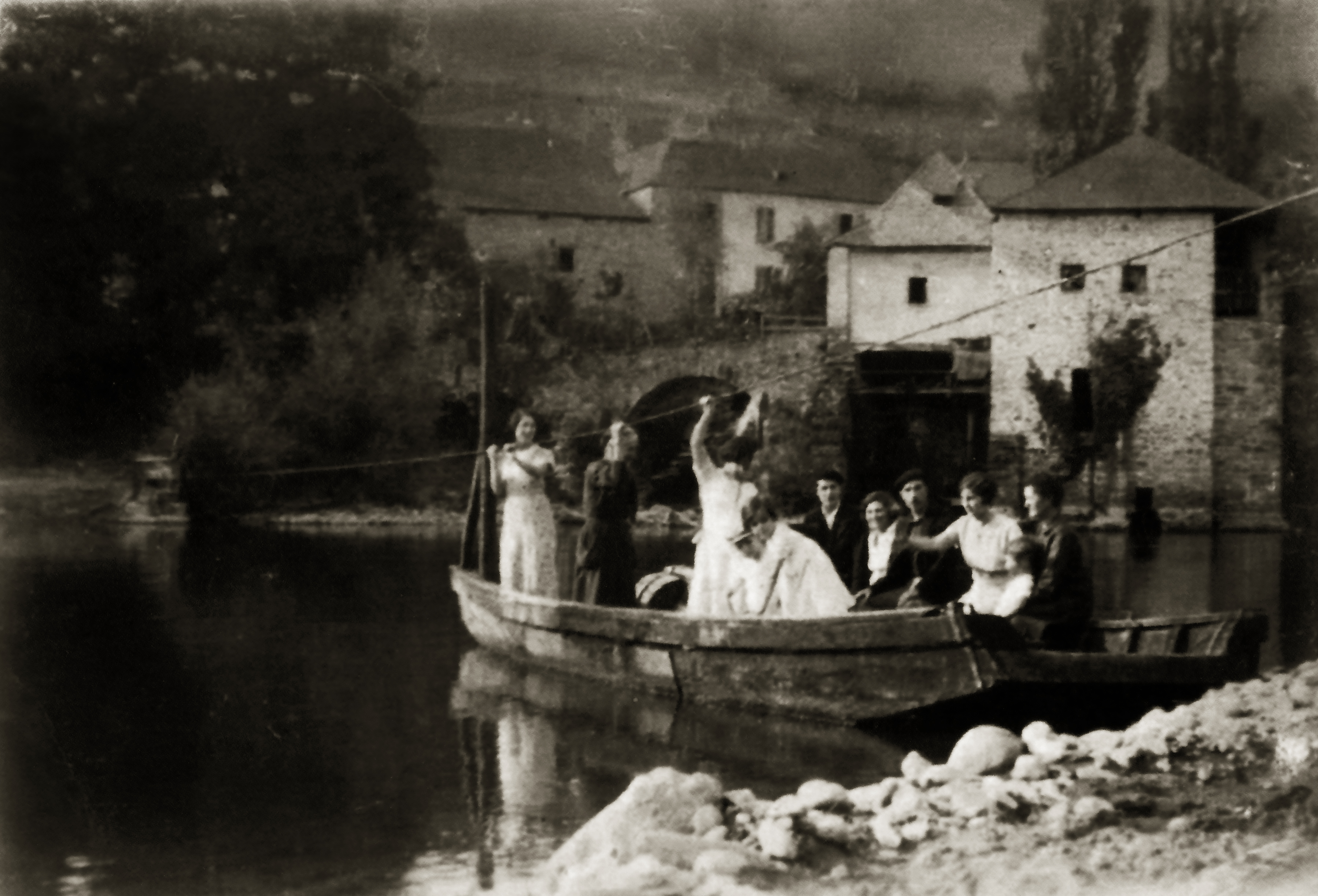 Bac du village de Saucède Pyrénées-Atlantiques (Aquitaine France).